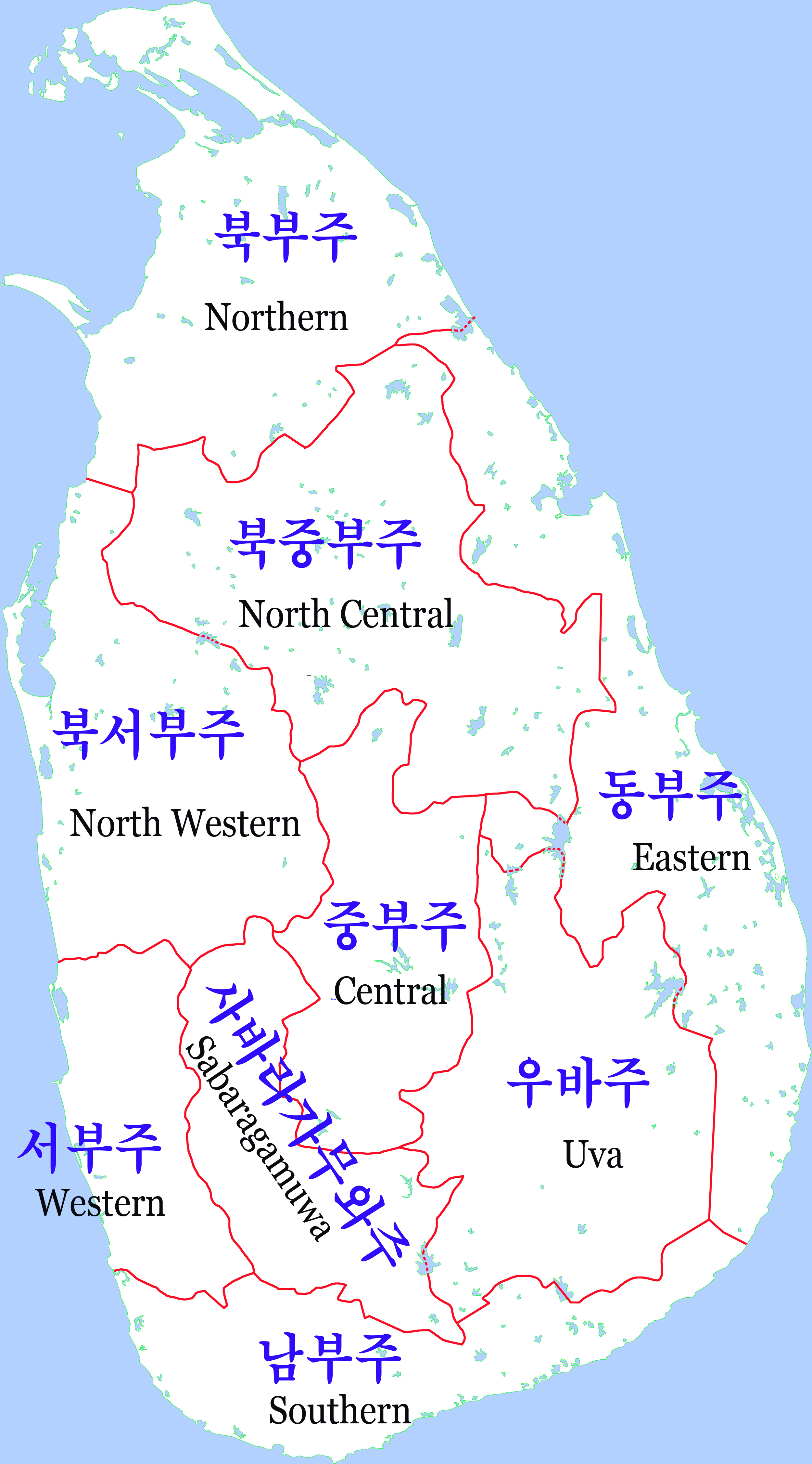 스리랑카 행정구역